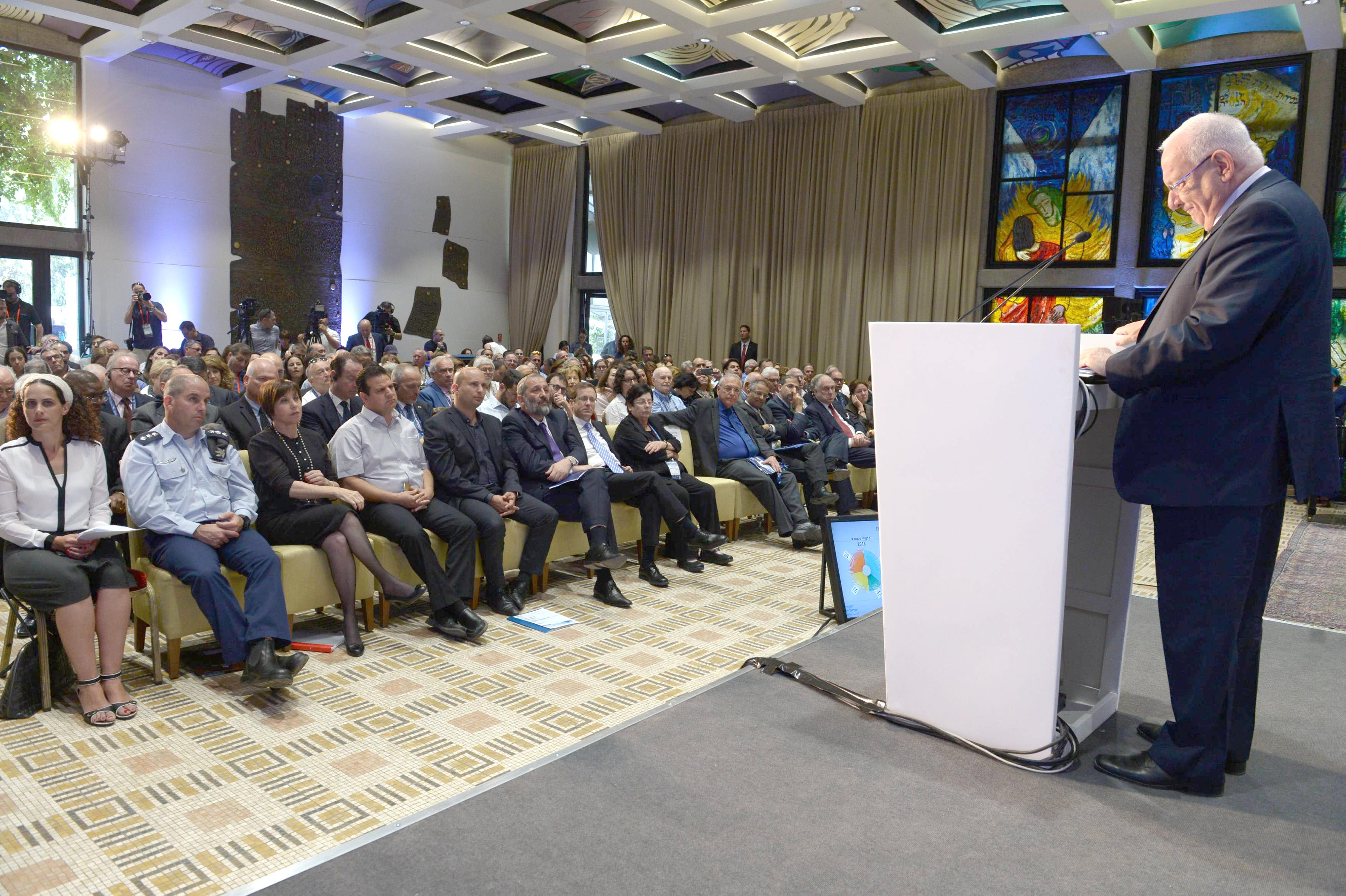 נשיא מדינת ישראל ראובן ריבלין נואם בכנס הרצליה ביום הראשון שהתקיים בבית הנשיא תחת הכותרת תקווה ישראלית משותפת- חזון או חלום.